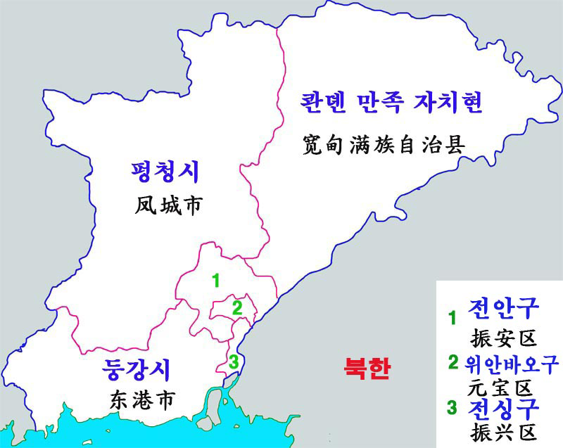 단둥시 현급구역도